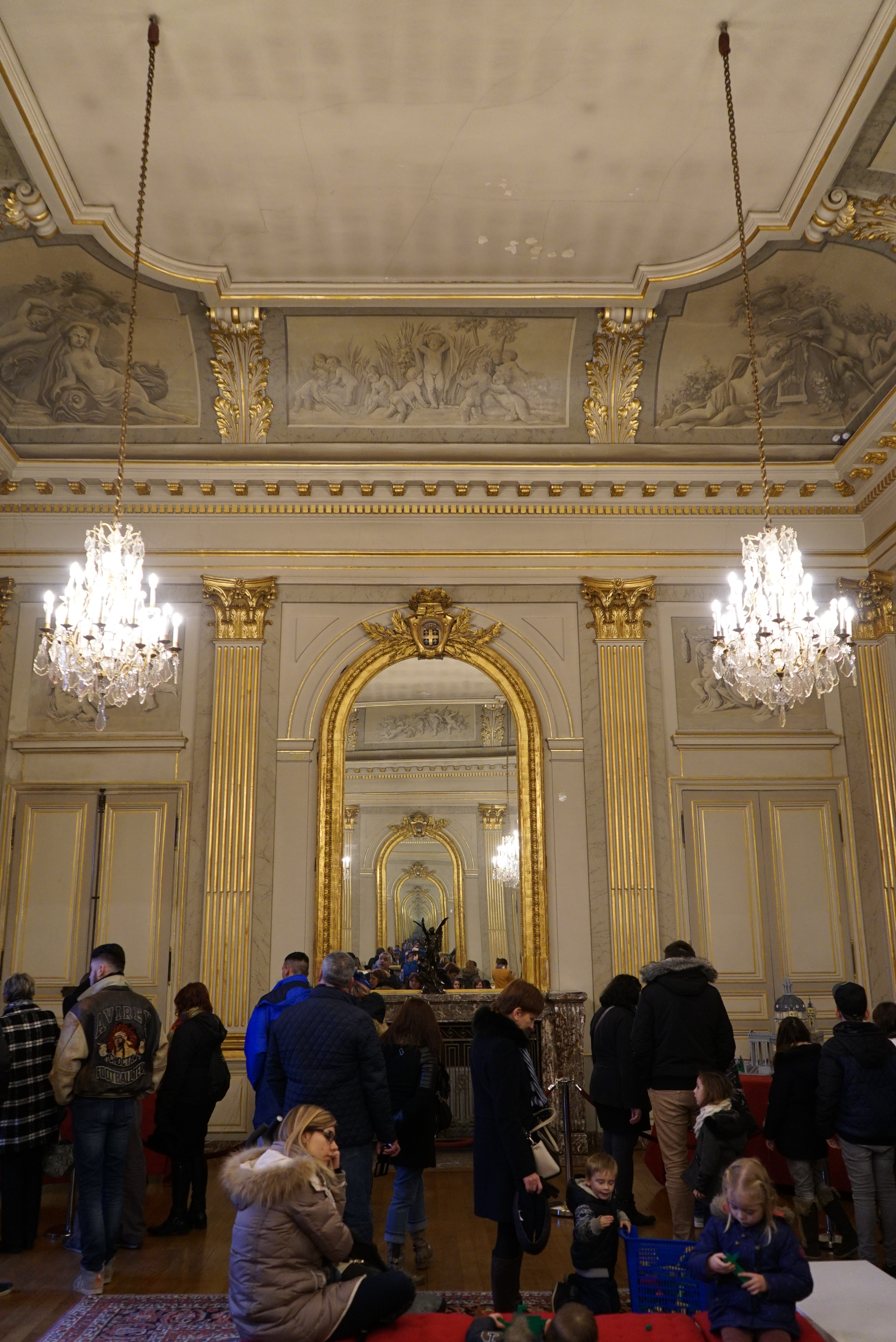 dans le Salon d'apparat de l'hôtel de ville de Châlons-en-Champagne.